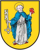 Wappen Albisheim